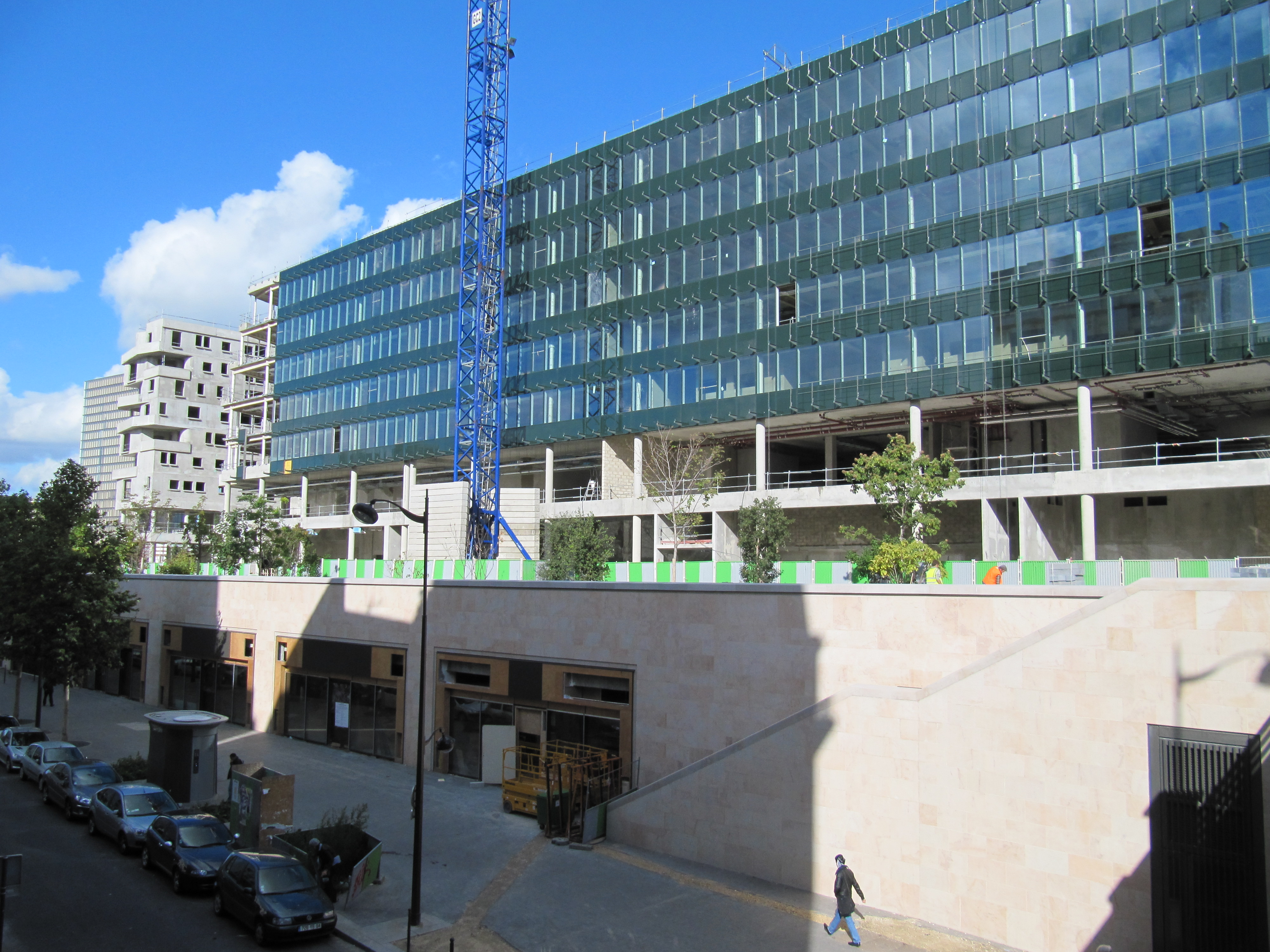 Le Quartier de Paris Rives Gauche, avec ses voies recouvertes en 2012.